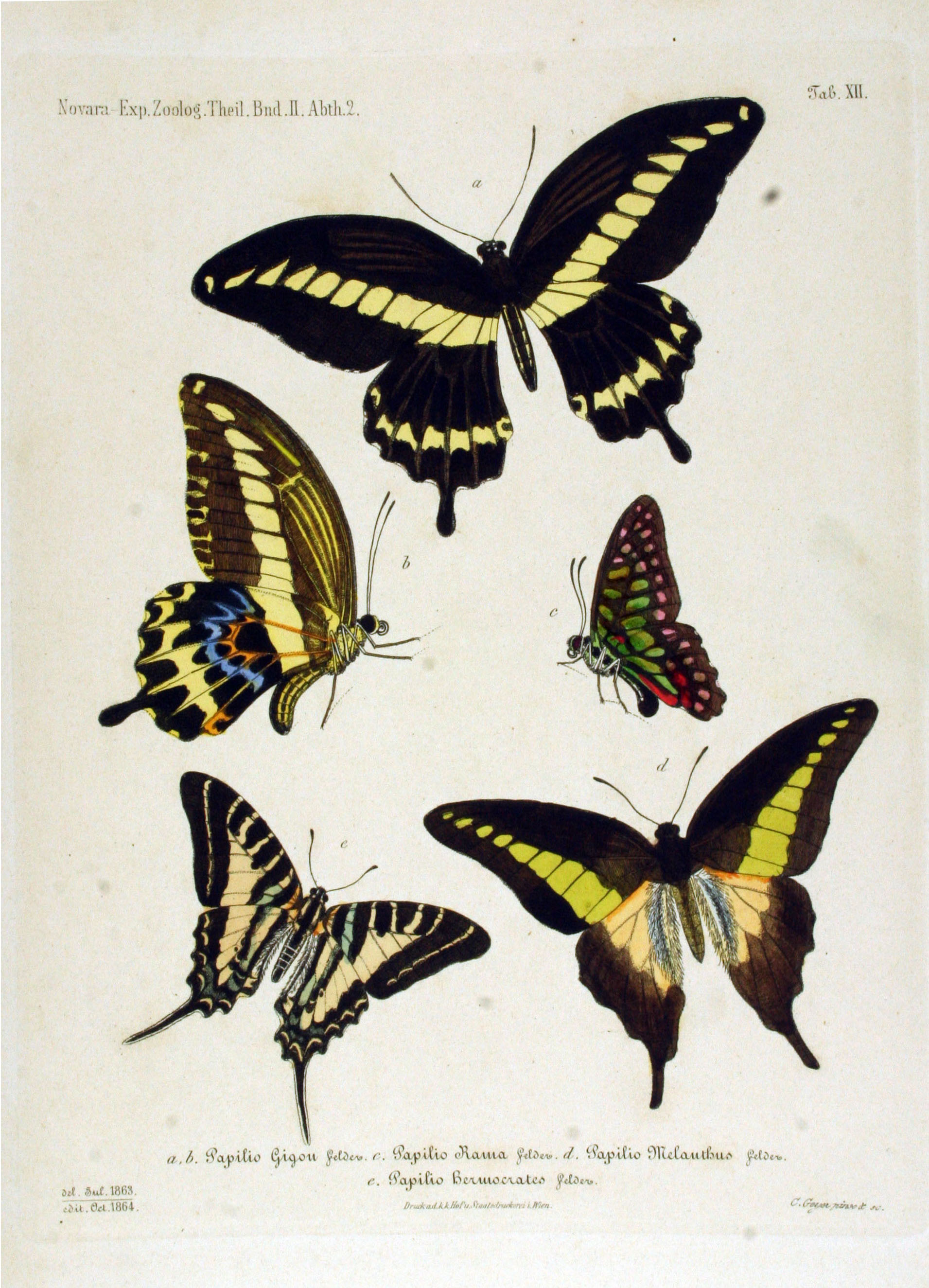 Felder C. and Felder R. Reise der Österreichischen Fregatte Novara um die Erde in den Jahren 1857, 1858, 1859 unter den Befehlen des Commodore B. von Wüllerstorf-Urbair. (1864) Zoologischer Theil. 2. Band. Zweite Abteilung: Lepidoptera. Atlas. Captions (may be invalid names) a,b Papilio gigon OK c Papilio rama Synonym of Graphium arycles arycles(Boisduval,1836) d Papilio melanthus Synonym of Graphium codrus melanthus (C. & R. Felder, 1862) e Papilio bermocrates misspelling Synonym of Graphium aristeus hermocrates (Felder & Felder,1865)